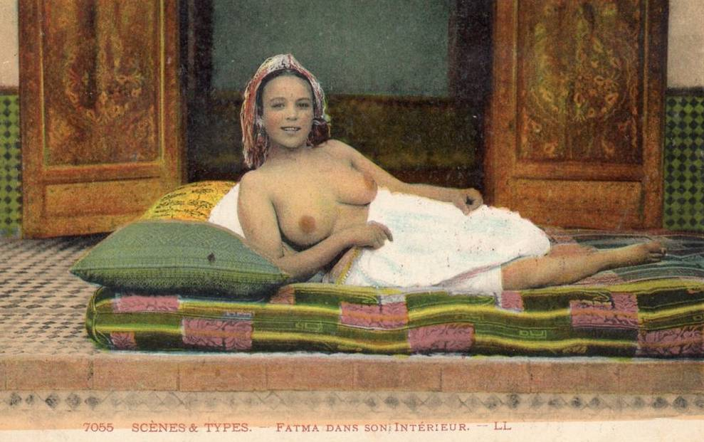 Levy & Fils postcards